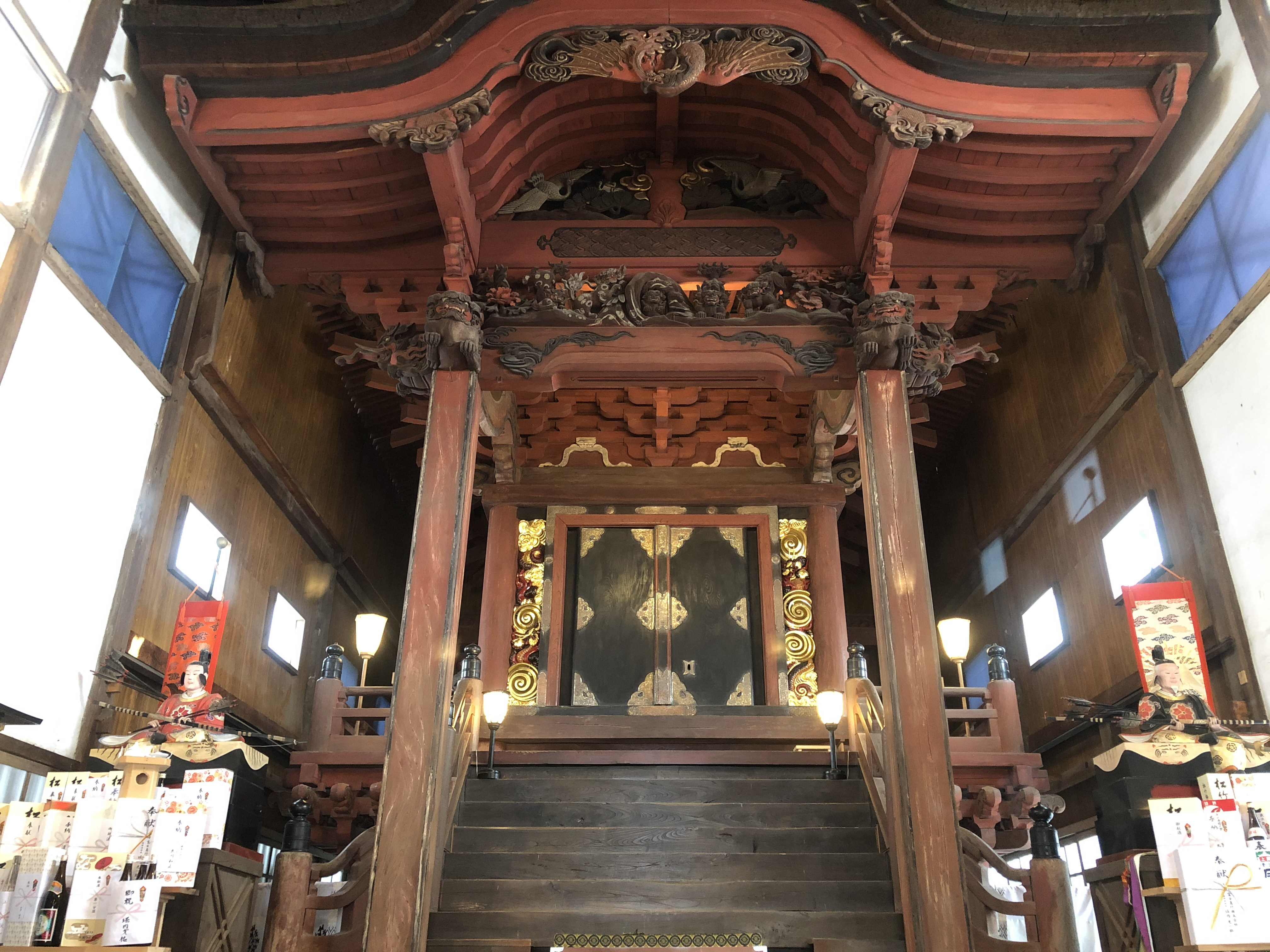 冨士山下宮小室浅間神社本殿、拝殿正面より拝観